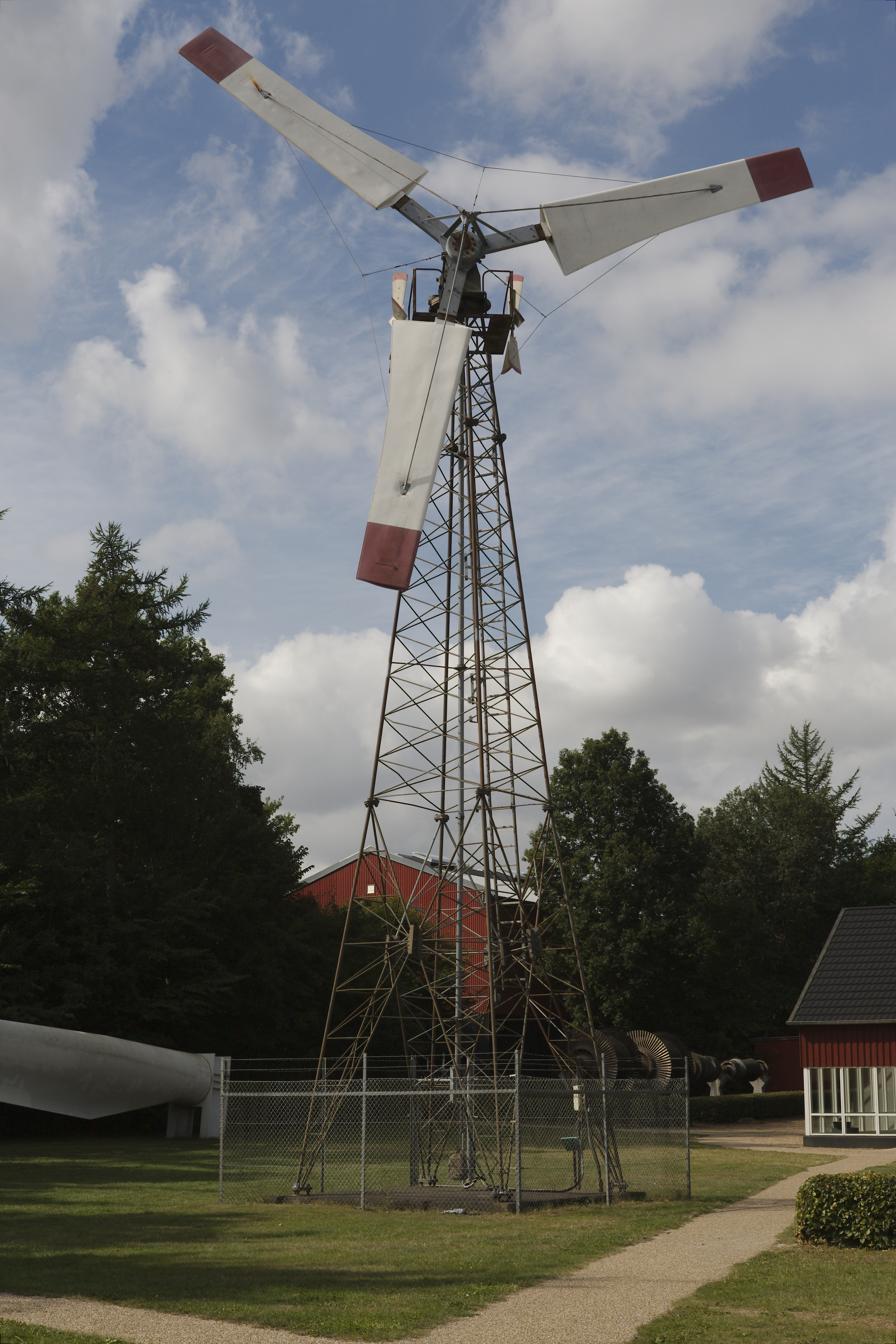 Riisagermøllen opstillet på Energimuseet